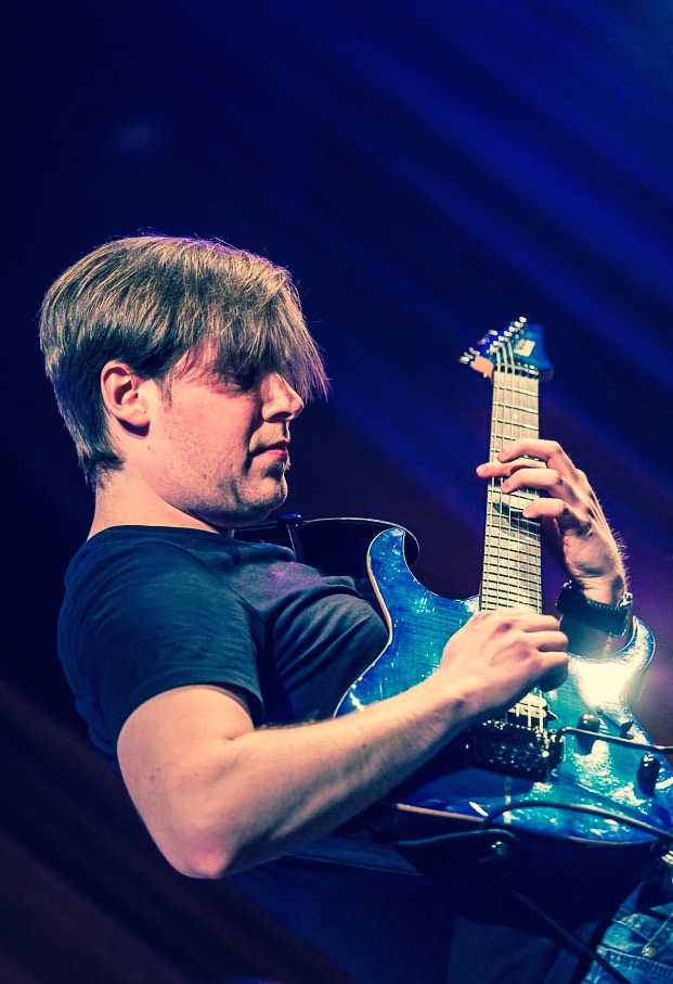 Tomas Bouda - Dresden Jazz Tone